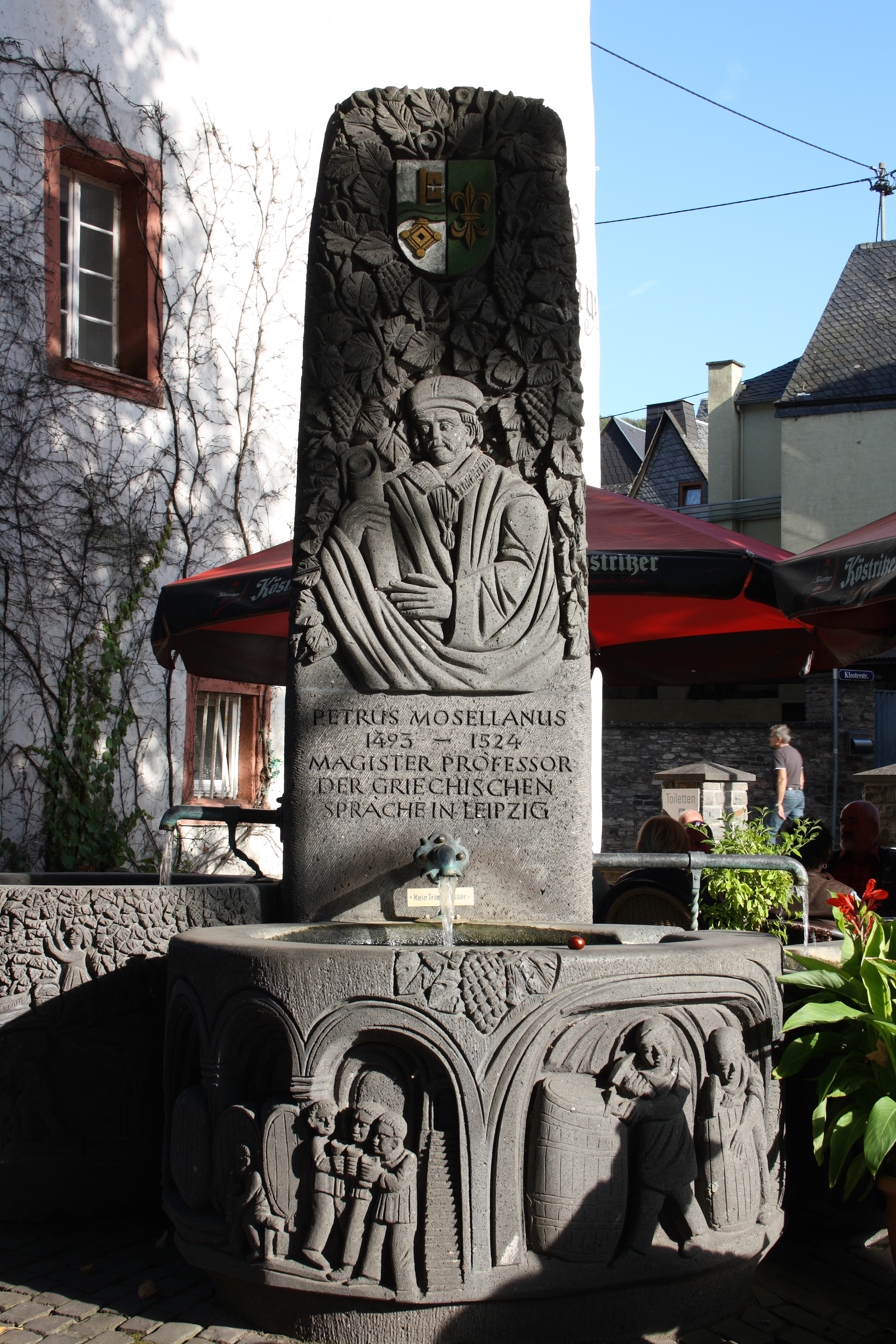 Brunnen in Bruttig (Hauptstraße 23), einem Ortsteil von Bruttig-Fankel im Landkreis Cochem-Zell (Rheinland-Pfalz)